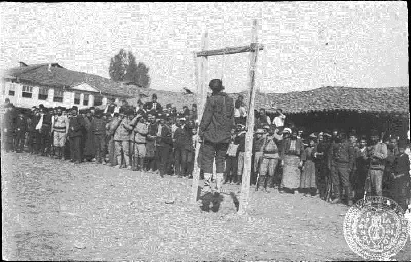 Обесването на македонския войвода Александър Турунджев на Битолския Ат пазар в 1905 година.